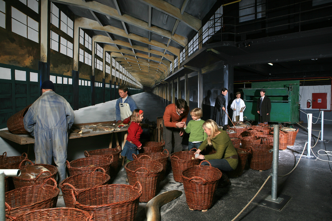 Familie die de visveiling bezoekt in themapark Seafront, Zeebrugge